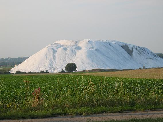 Blick auf den Kaliberg Aufgenommen mit: Canon Digital IXUS 400 Copyright Status: GNU Freie Dokumentationslizenz